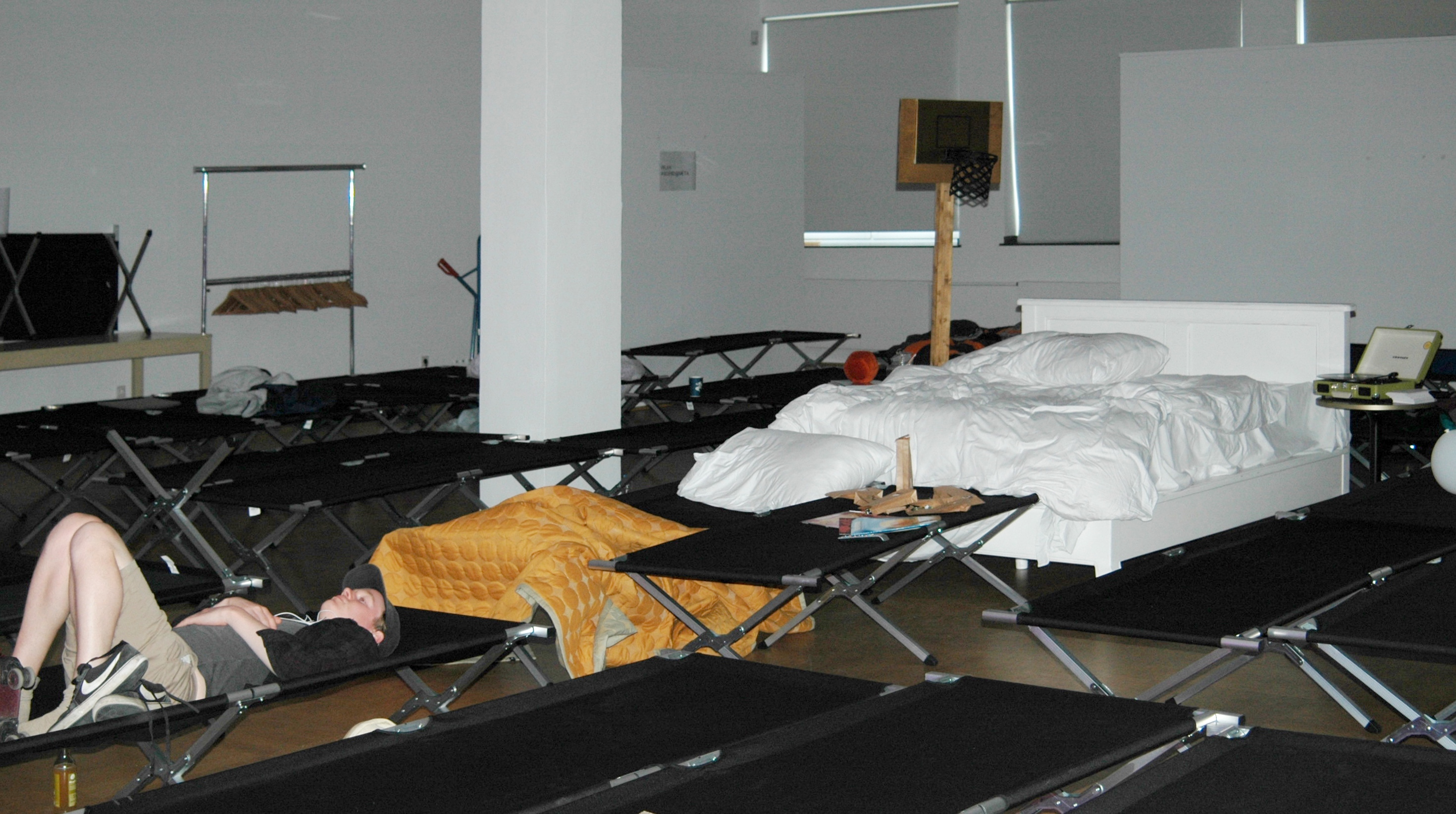 NRW-FORUM DÜSSELDORF, META Marathon, Schlafsaal